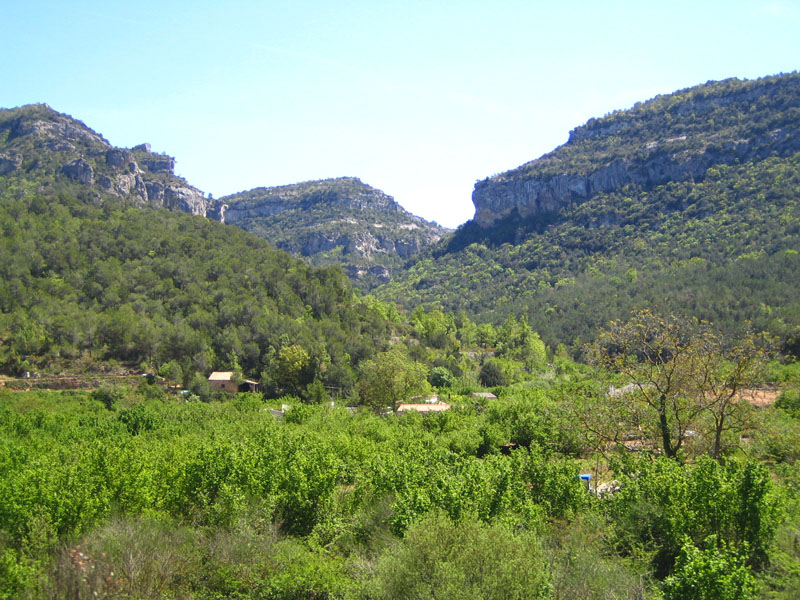 Les Muntanyes de Prades, entre l'Alt Camp, el Baix Camp i la Conca de Barberà, Catalunya. Aquest paratge és a prop de Capafonts.